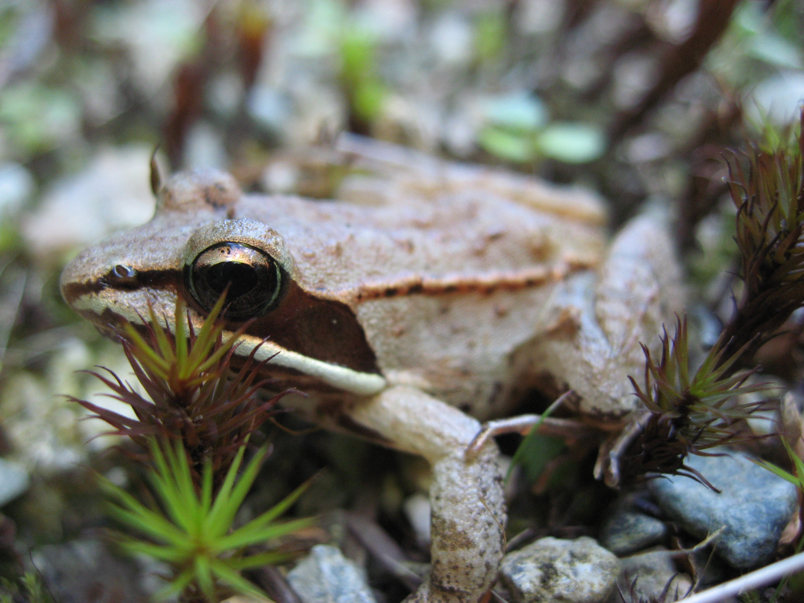 A young wood frog.